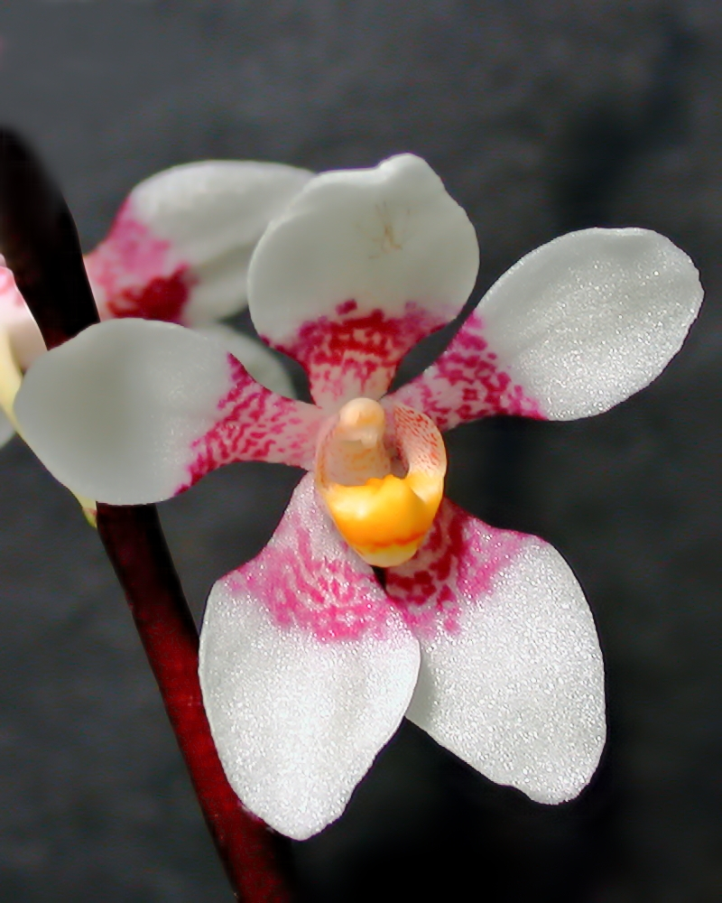 Sarcochilus fitzgeraldii